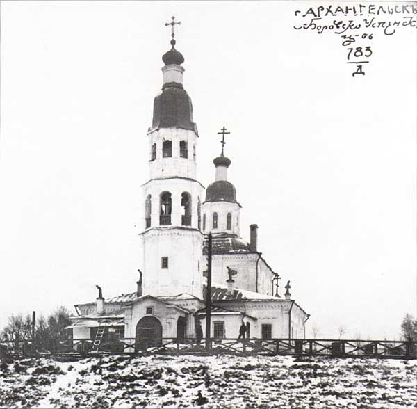 г. Архангельск. Успенско-Боровская церковь и "падающая колокольня". Вид с запада. Фото около 1909 г. Институт истории материальной культуры Российской Академии наук.